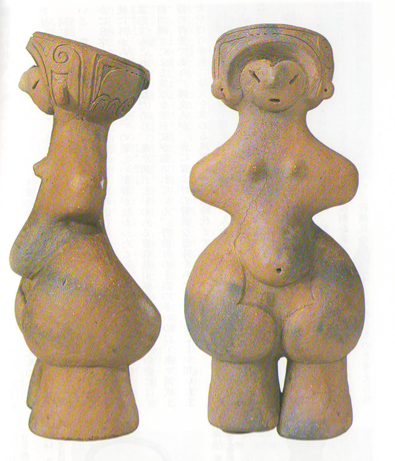 中文（台灣）: 有懷孕特徵的土偶